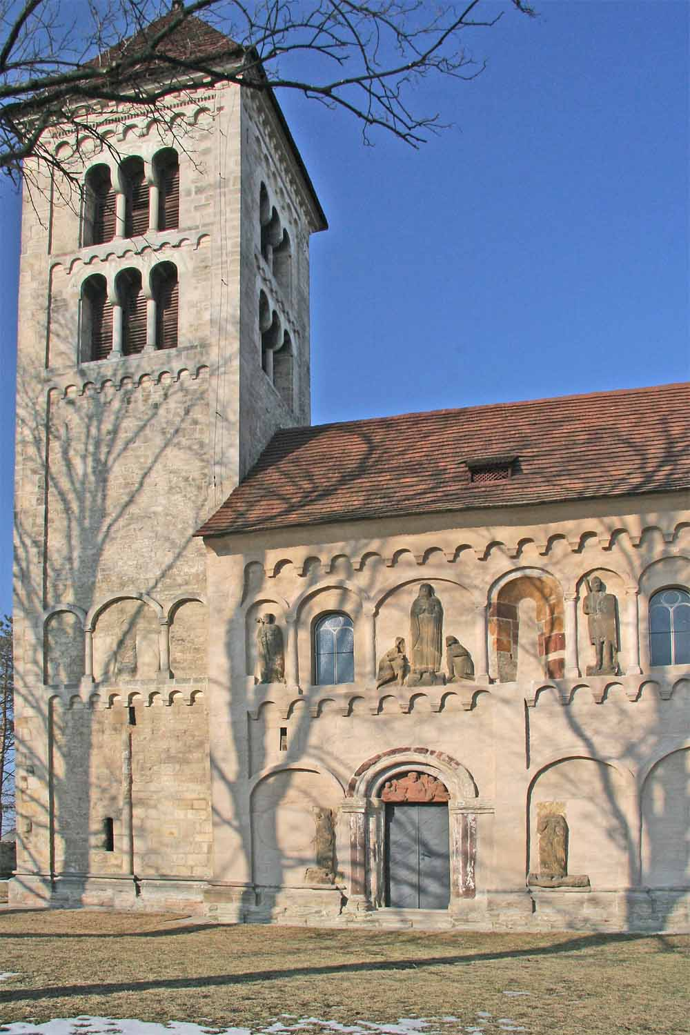 Románský kostel Svatého Jakuba v osadě Jakub u Kutné Hory autor:Zp